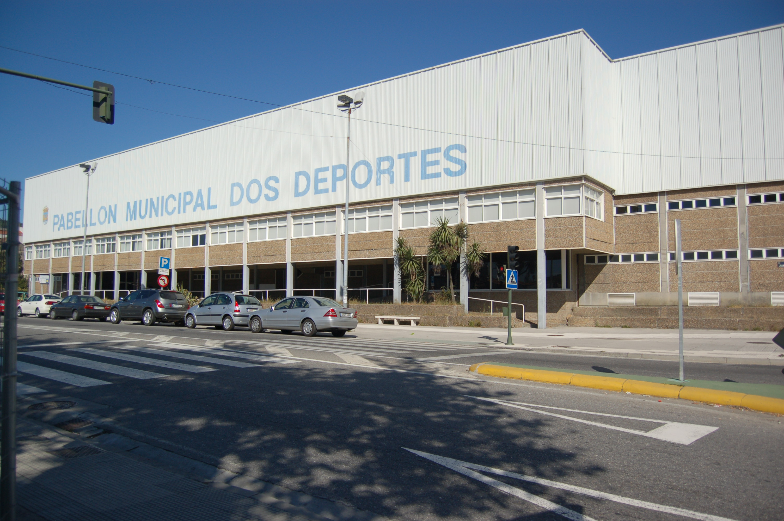 Pavillón Municipal dos Deportes de Pontevedra.